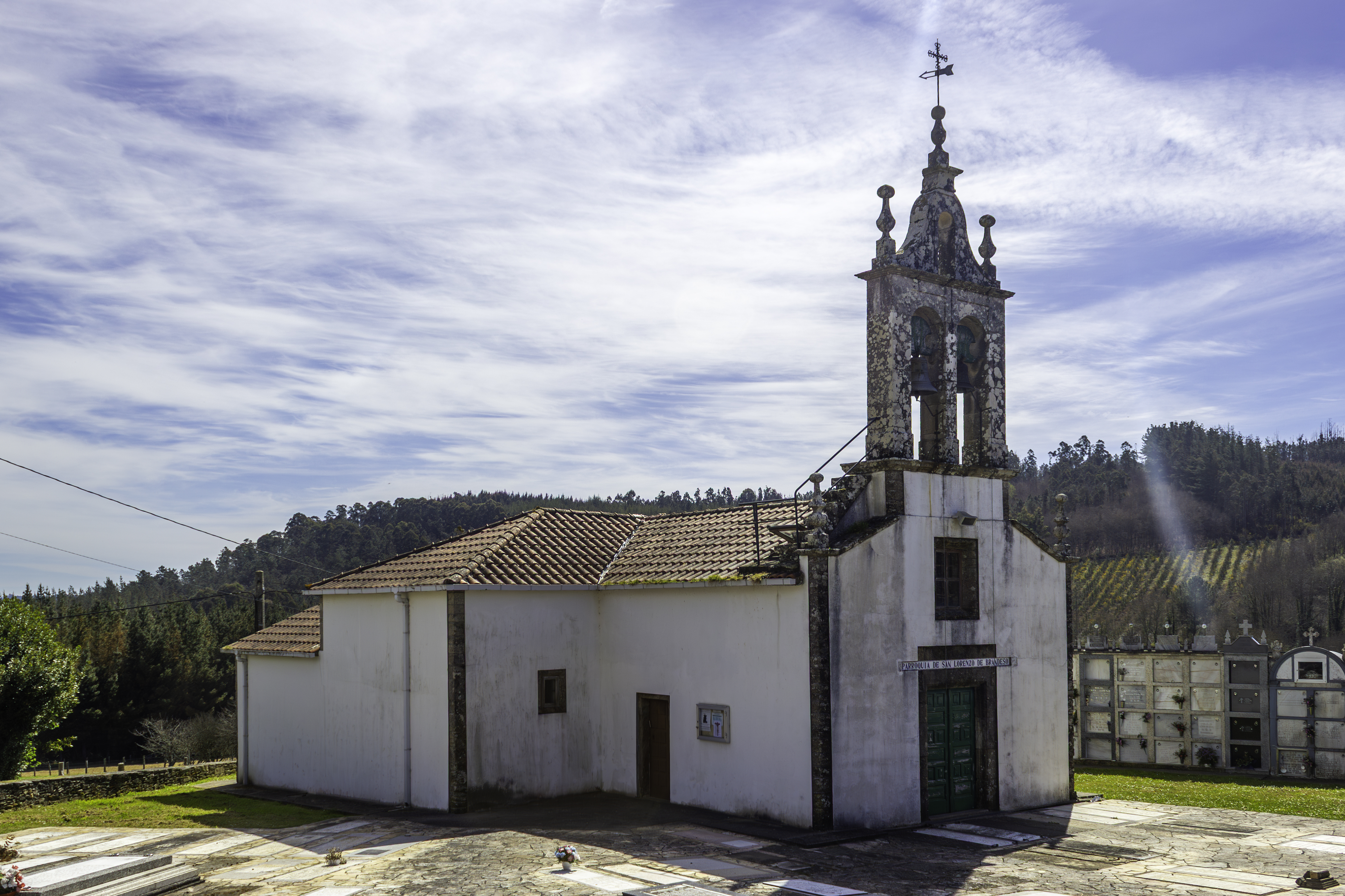 Igrexa de Santa María de Bemil, no concello de Arzúa.